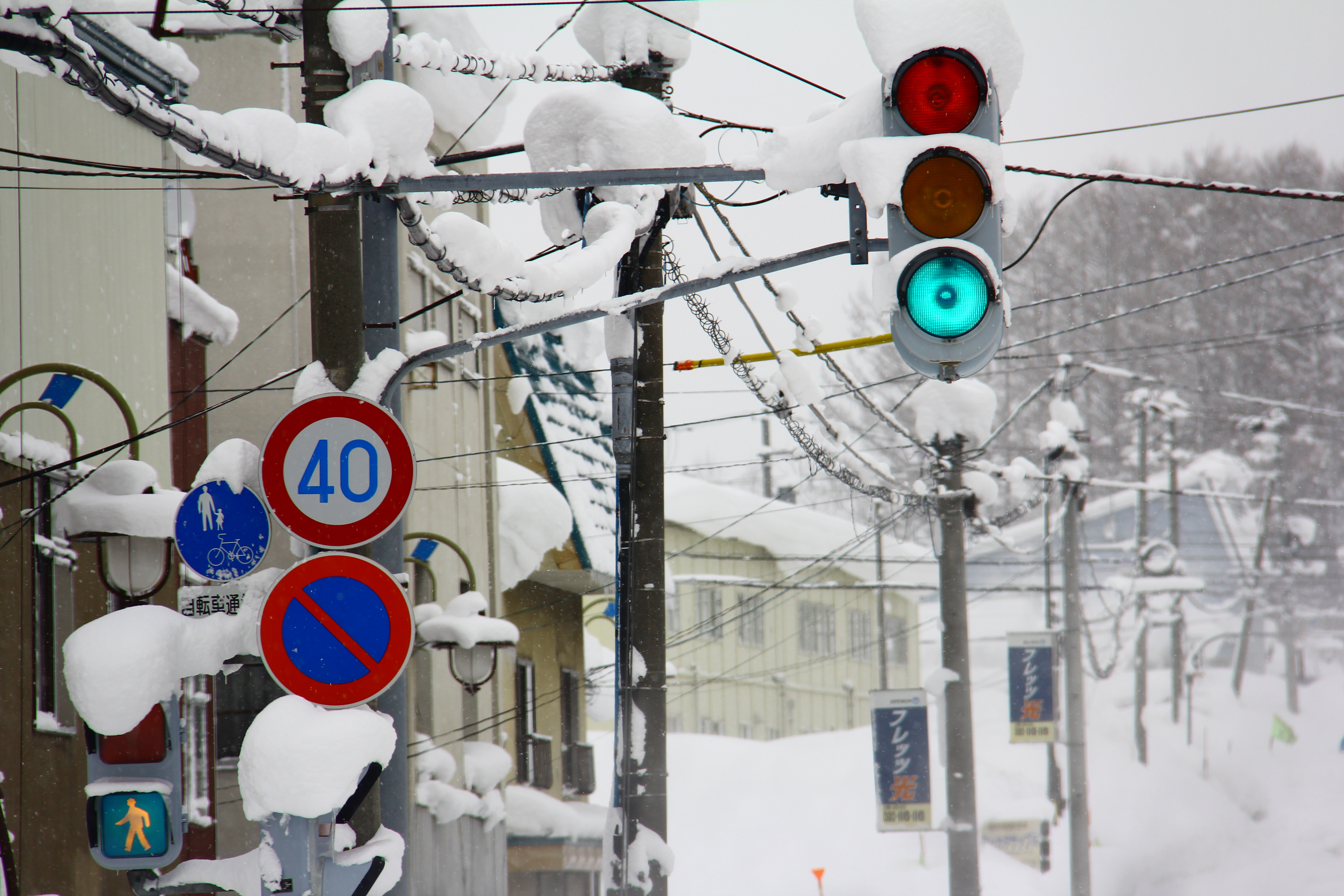 Niseko / Annpuri - Hokkaido - Japan フレッツ光